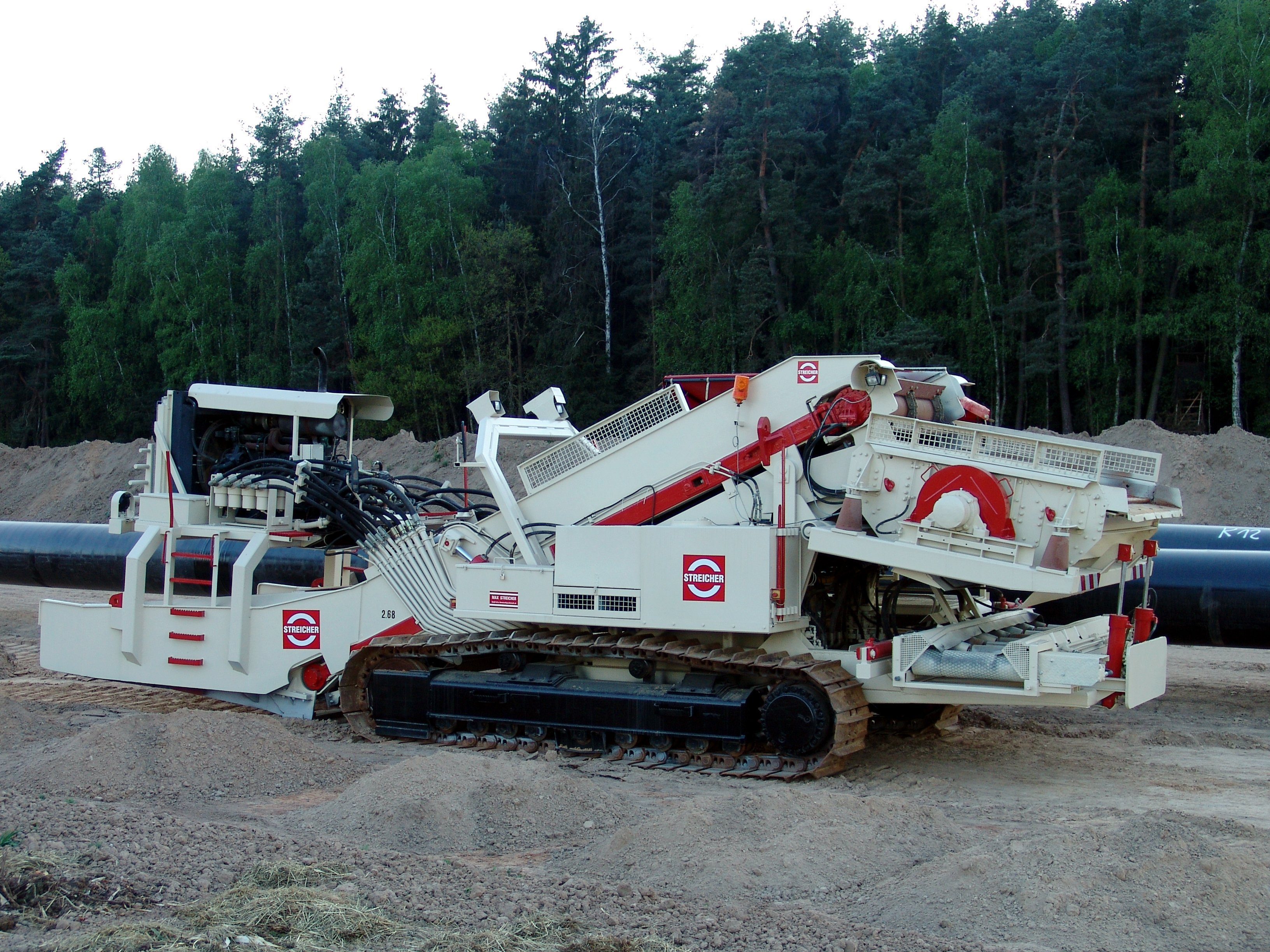 Mobile Sieblinie